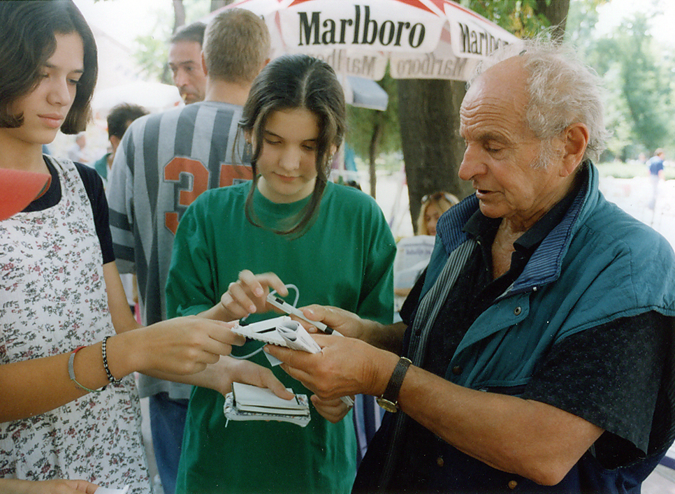 Mihajlo Bata Paskaljević na Filmskim susretima u Nišu 1997. godine